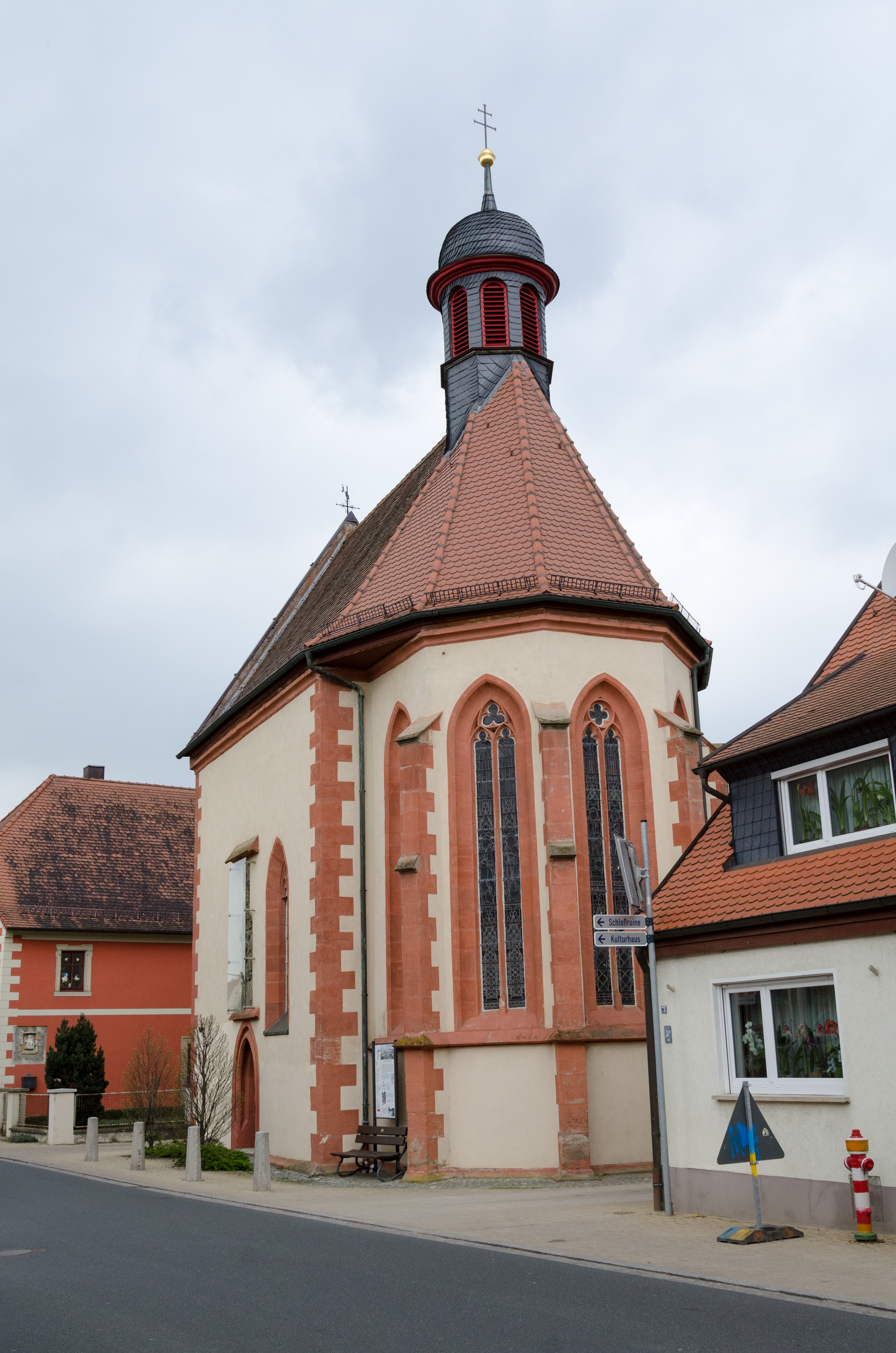 Großlangheim, Katholische Kapelle St Antonius Eremita